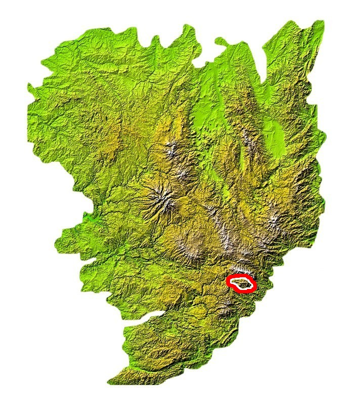 situation du massif du Bougès sur la carte du Massif central